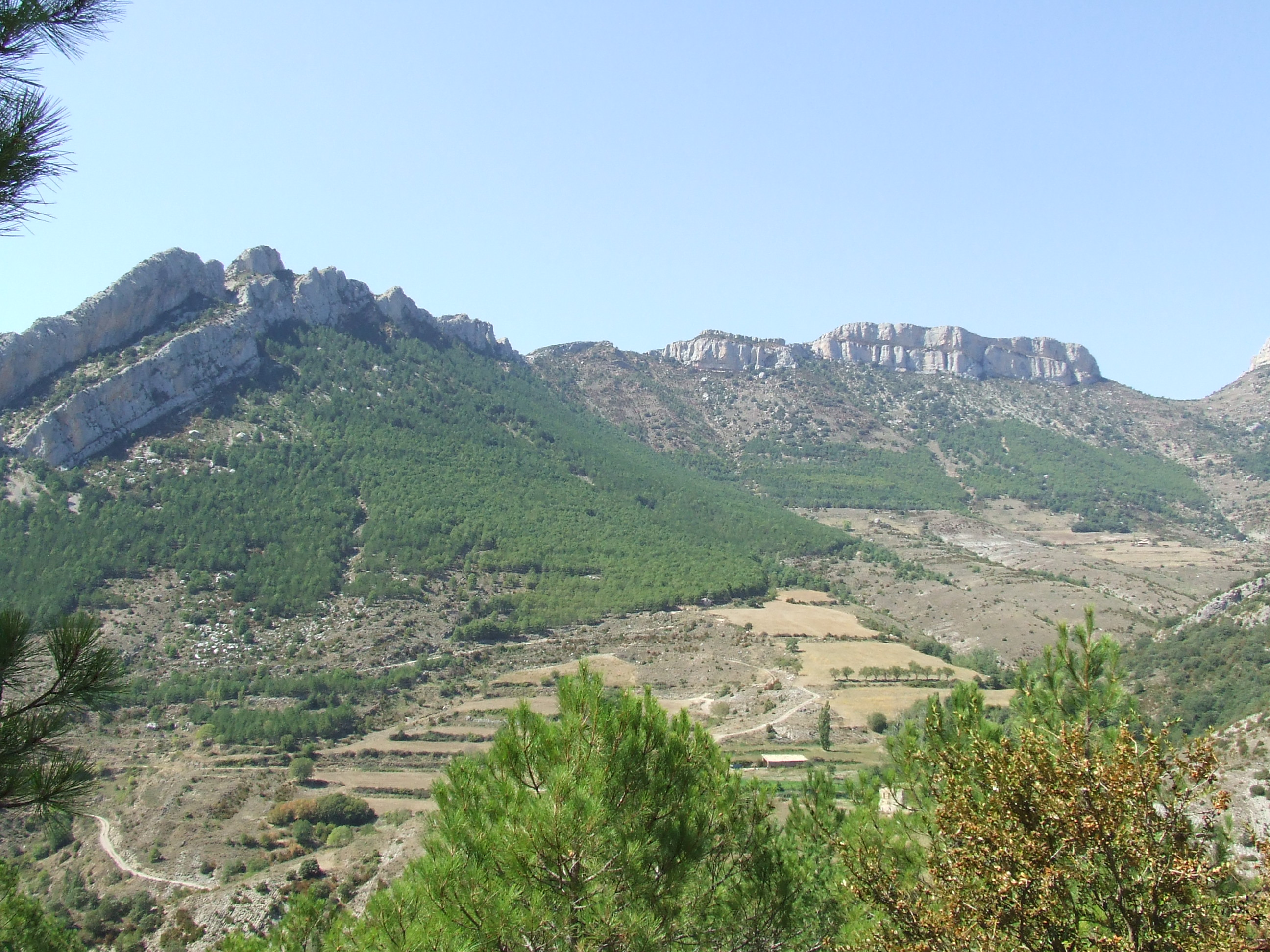 La vall del Barranc de Caborrriu (Abella de la Conca, Pallars Jussà)